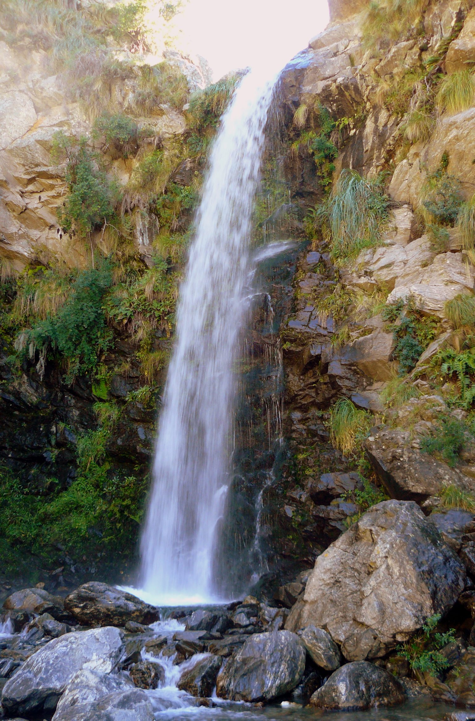 El famoso "Salto del Tabaquillo" en Merlo.